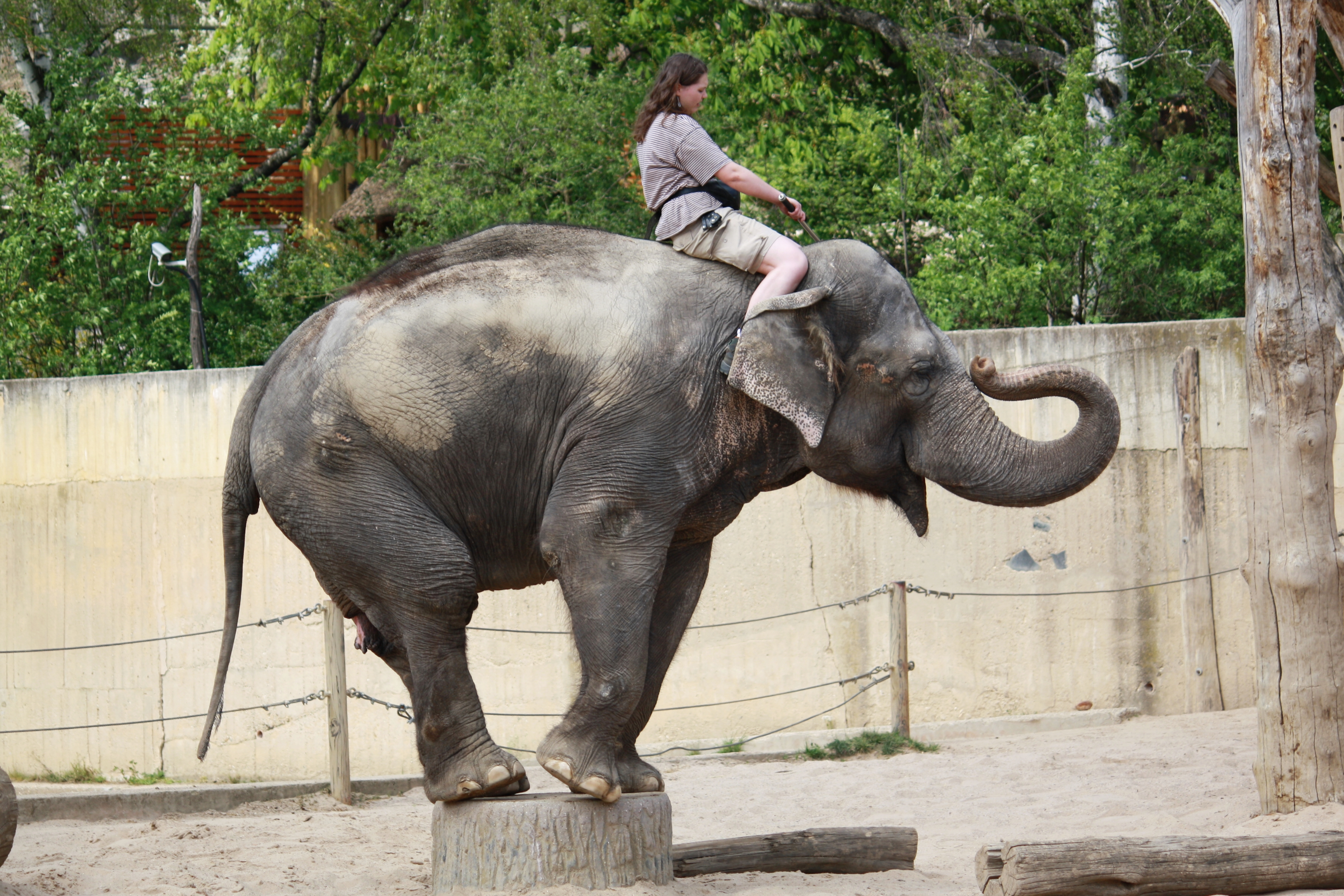 Zoo Praha